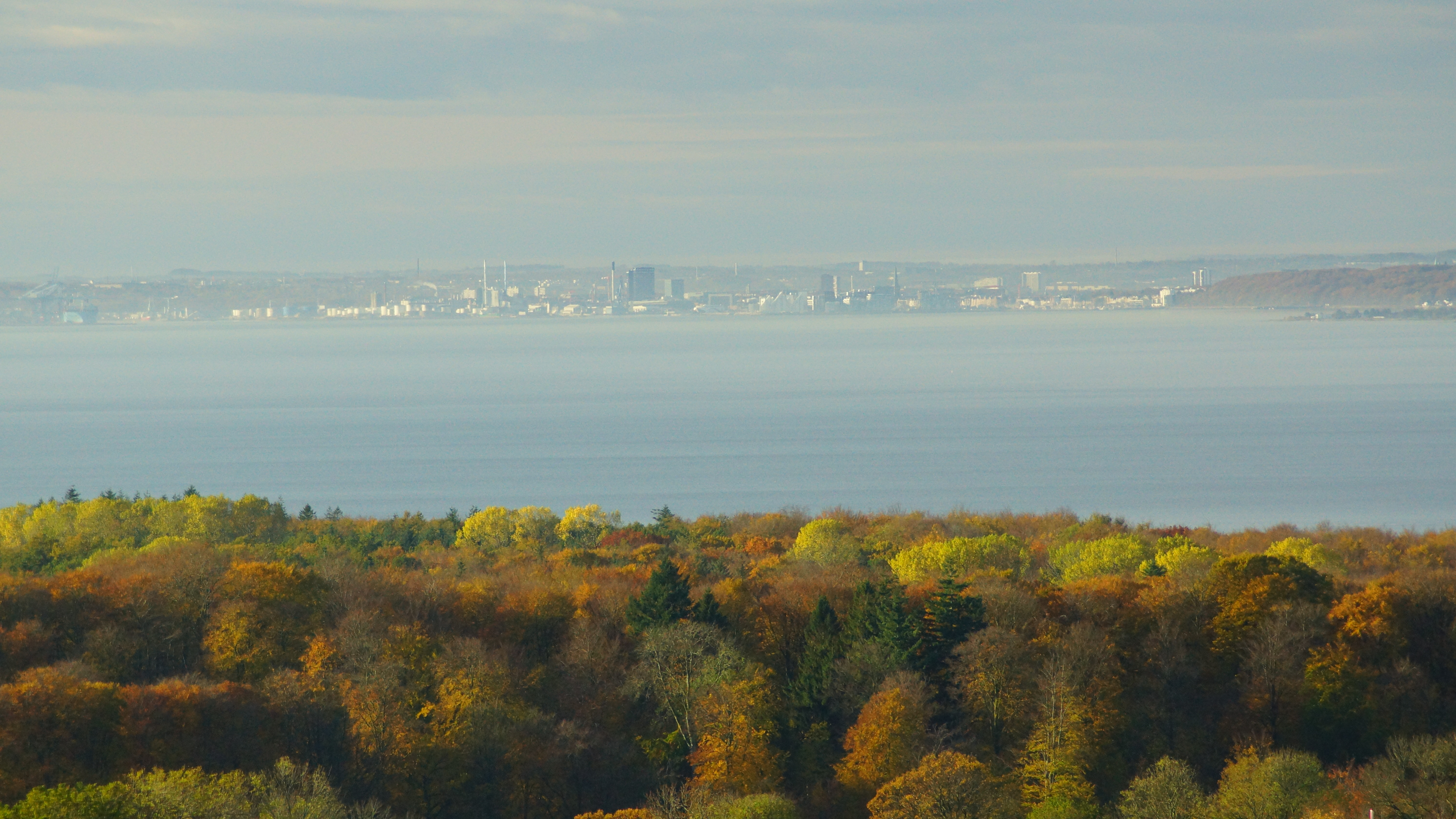 Århus set hen over Århus Bugt og Hestehave Skov fra toppen af Rønde.